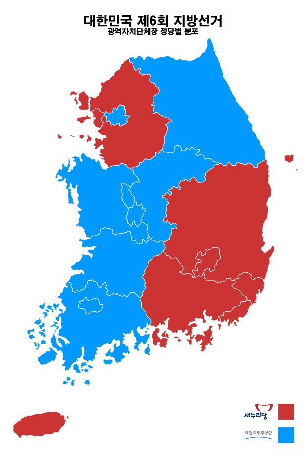 대한민국 제6회 지방선거, 광역자치단체장 정당별 분포